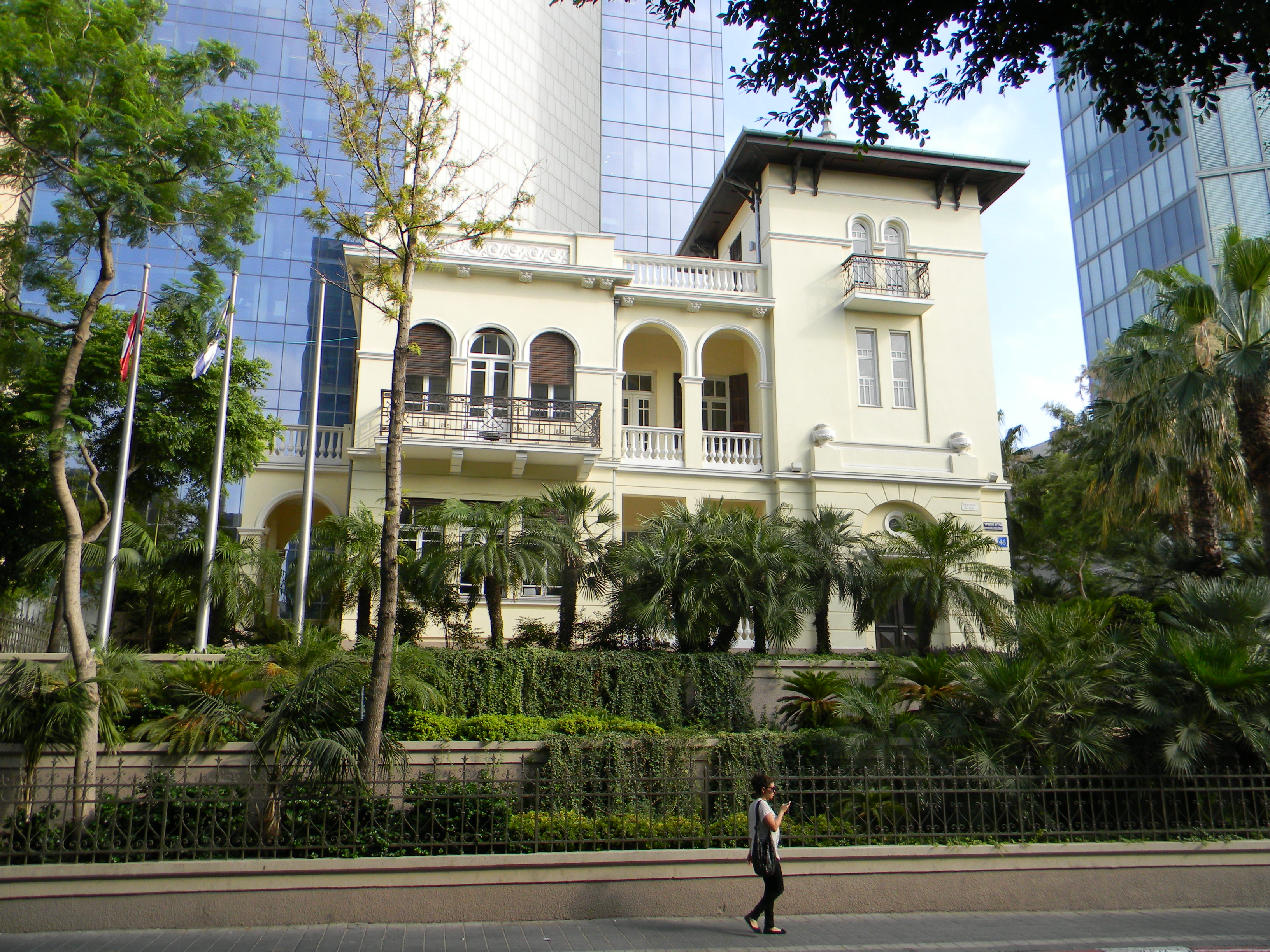 שדרות רוטשילד היו בין ארבעת הרחובות הראשונים של תל אביב (שנקראה אז "אחוזת בית"), שנחנכו לאחר רחוב הרצל (הרחוב הראשון בעיר), ובניצב אליו. הרחובות נסללו על גבי דיונות חול אשר יושרו ושוטחו, ולאורכם נבנו בתיה הראשונים של העיר. התוואי שהפך להיות השדרה היה ואדי קטן שאותו קשה היה ליישר באמצעים של אז, ואליו גם התנקזו מים רבים בחורף. בשל כך הוחלט למלאו בחול להשאירו כשטח פתוח שעליו לא ייבנו בתים אלא בצדיו, כרחוב עירוני רחב יותר. בט"ו בשבט ה'תר"ע (1910) החלו נטיעות בשטח פתוח זה, במטרה להפוך את הרחוב לשדרה הראשונה של העיר. חודשים אחדים לאחר מכן, בדצמבר 1910, החליט ועד אחוזת בית לקרוא לשדרה על שם הברון רוטשילד, ולמנות את מרדכי בן הלל הכהן ואת מאיר דיזנגוף להודיע על כך באופן רשמי לברון. אנשי אחוזת בית ראו בשדרה את תחילתה של שדרה מפוארת כדוגמת הבולווארים המפוארים של פריז.